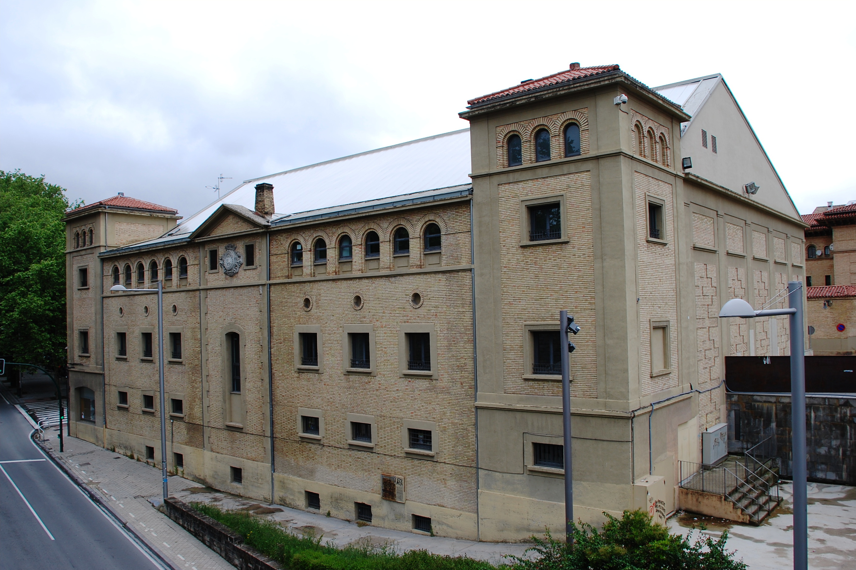 Frontón Labrit de Pamplona (Navarra, España)